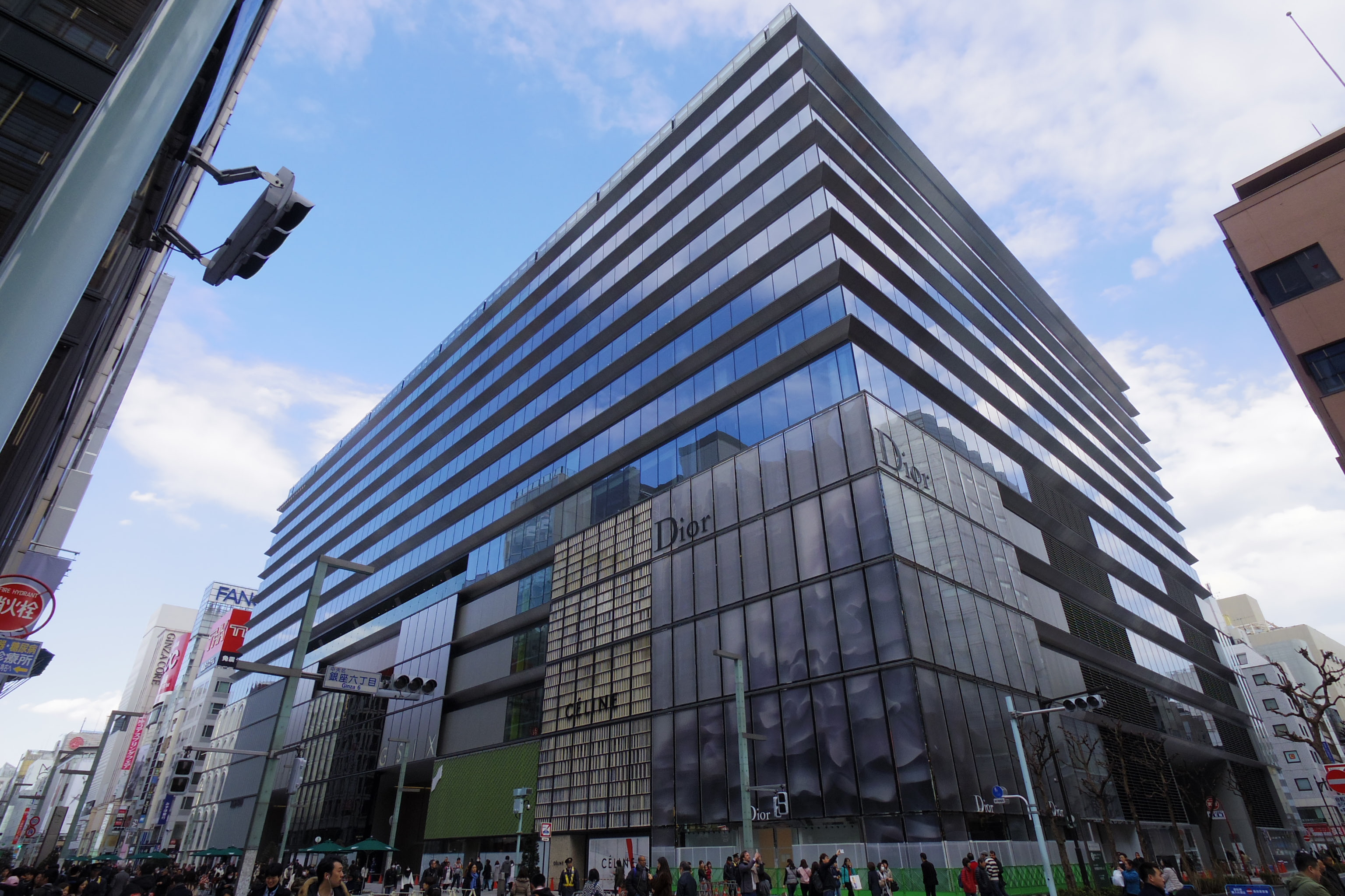 銀座松坂屋跡に建設された新商業施設、Ginza Six（中央区銀座6丁目）。